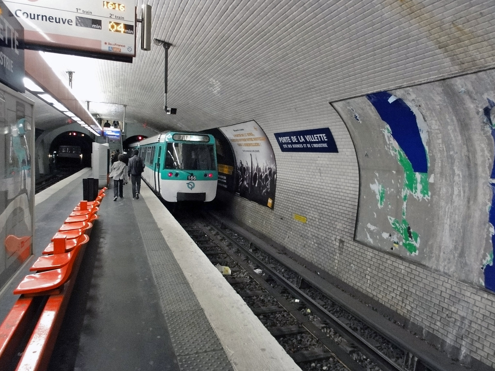 Station Porte de la Villette de la ligne 7 du métro de Paris, France.